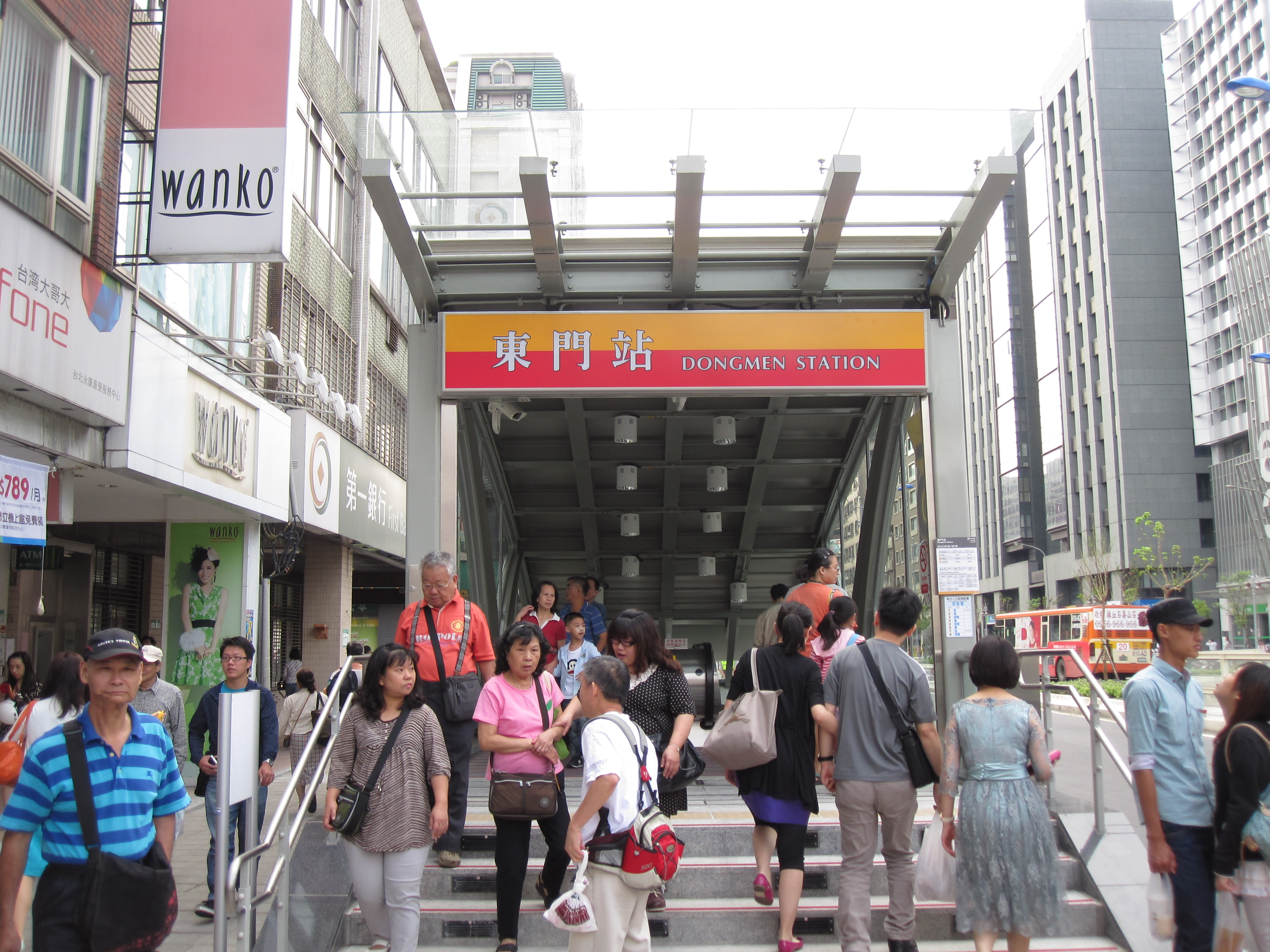 台北捷運東門站出口5